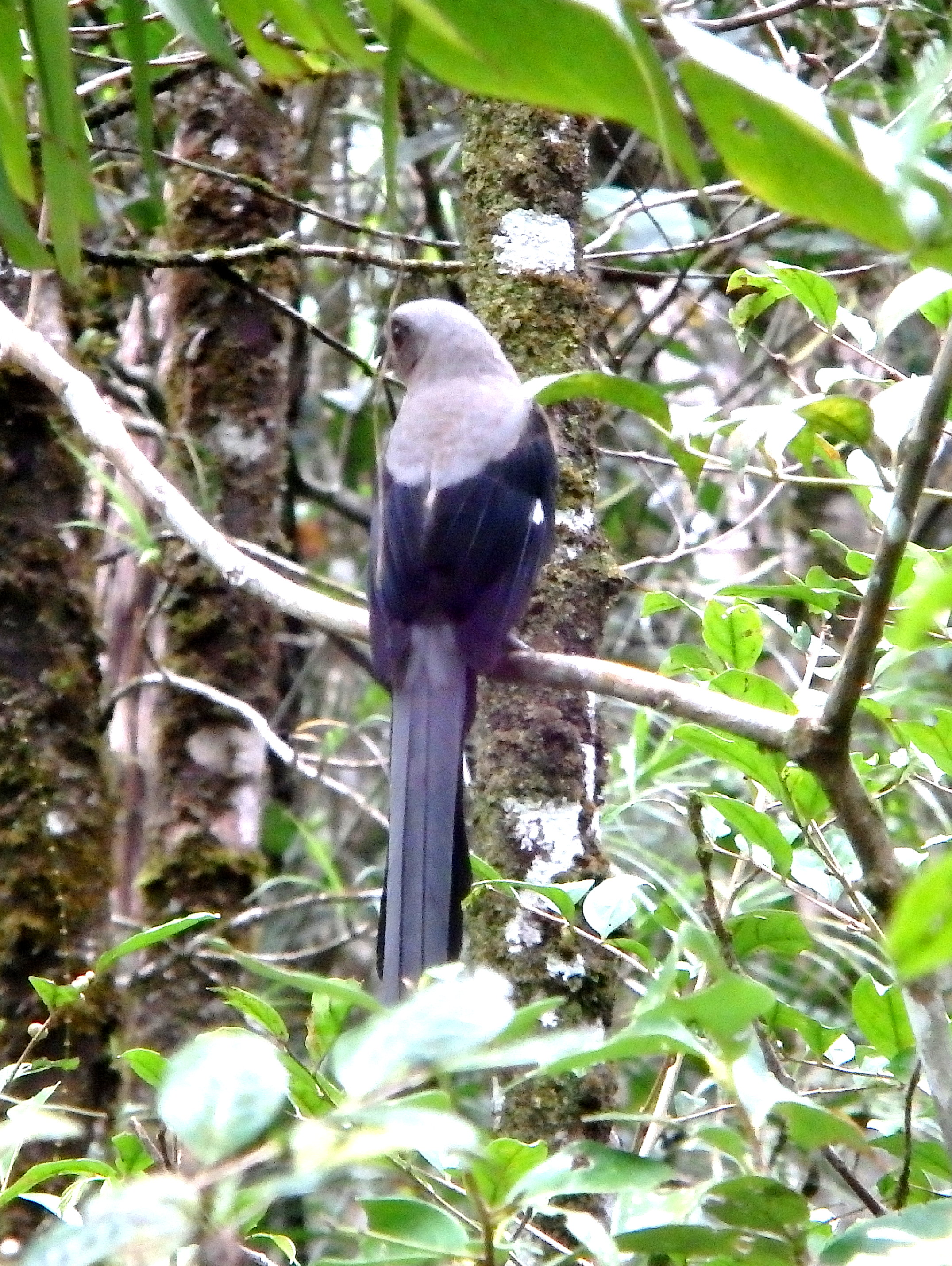 Kinabalu Park, Ranau, Sabah, Malaysia